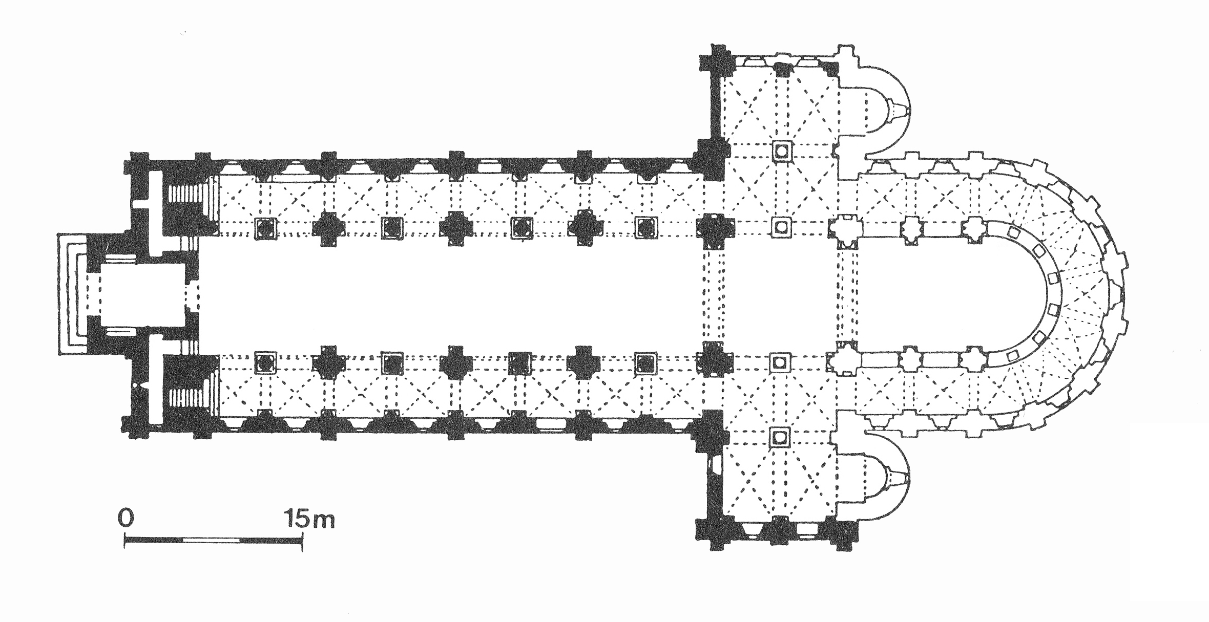 Grundriss der Abteikirche Notre-Dame in Jumièges, Normandie, 1040-1067